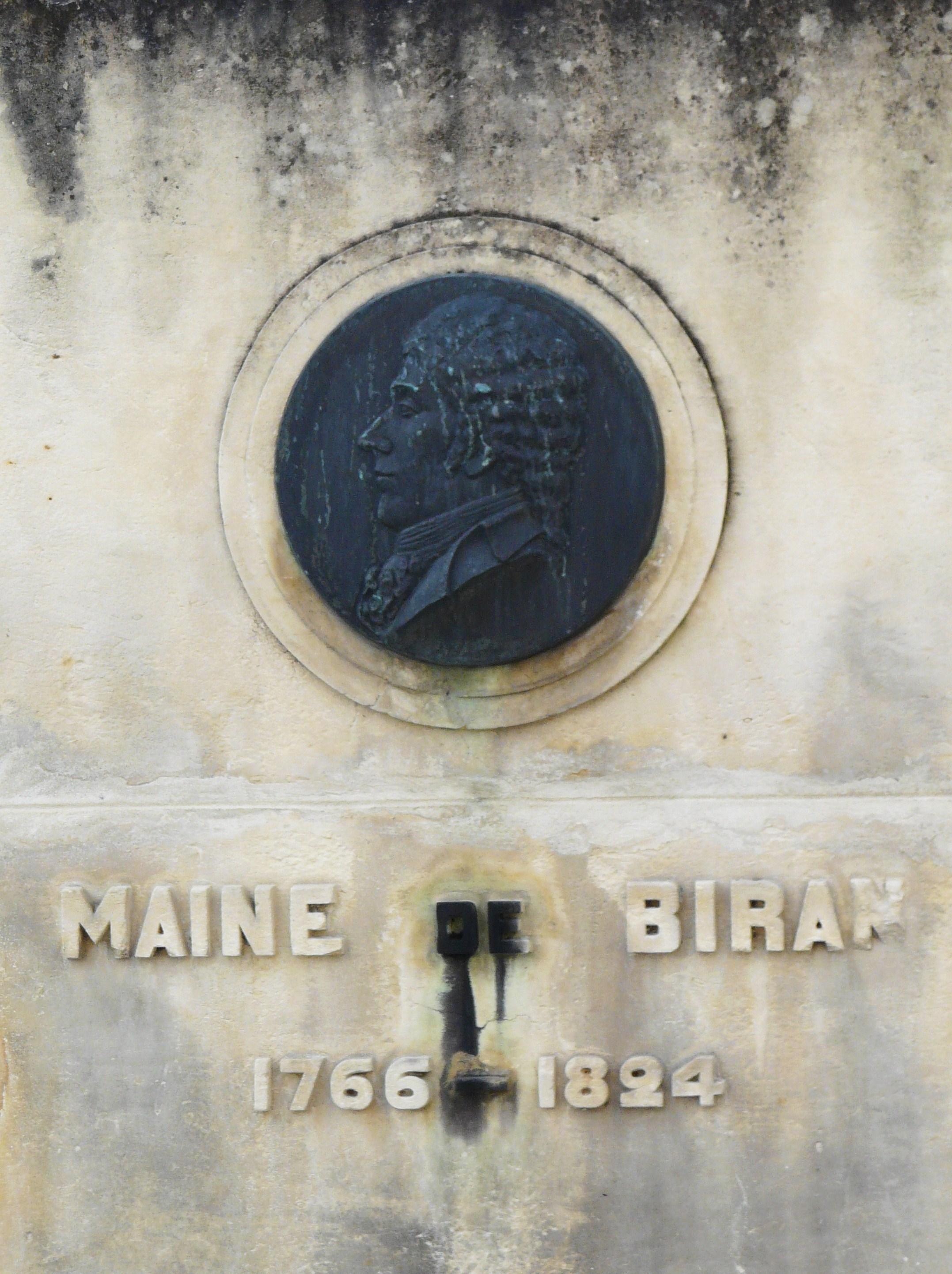 Plaque à la mémoire du philosophe Maine de Biran, Saint-Sauveur, Dordogne, France.